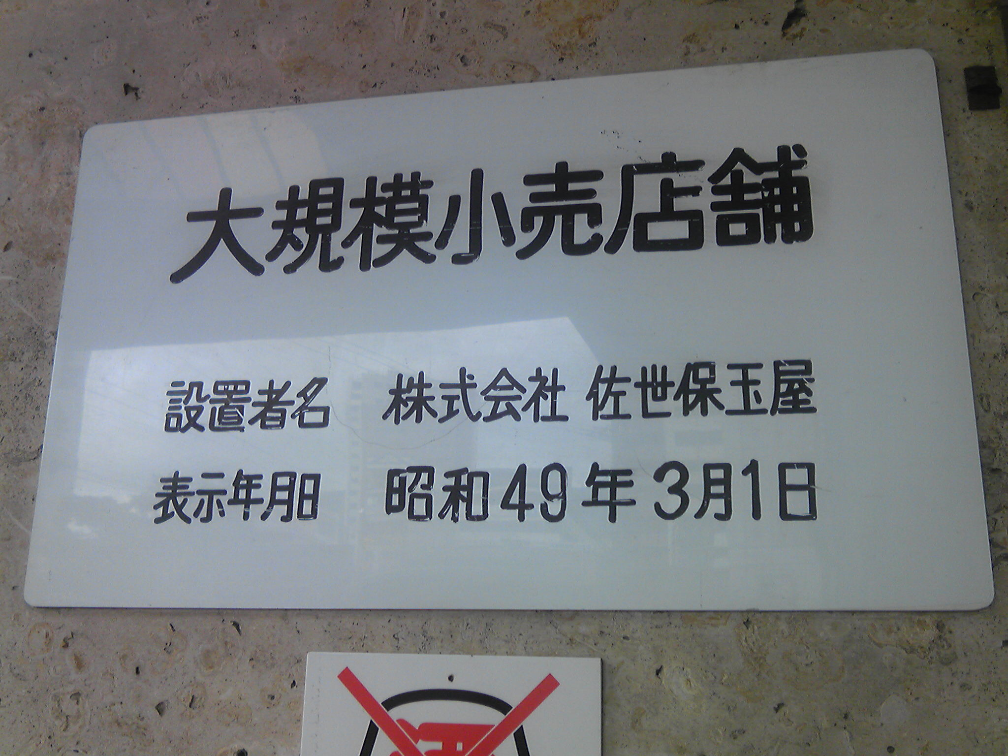 佐世保玉屋の大規模小売店舗表示板